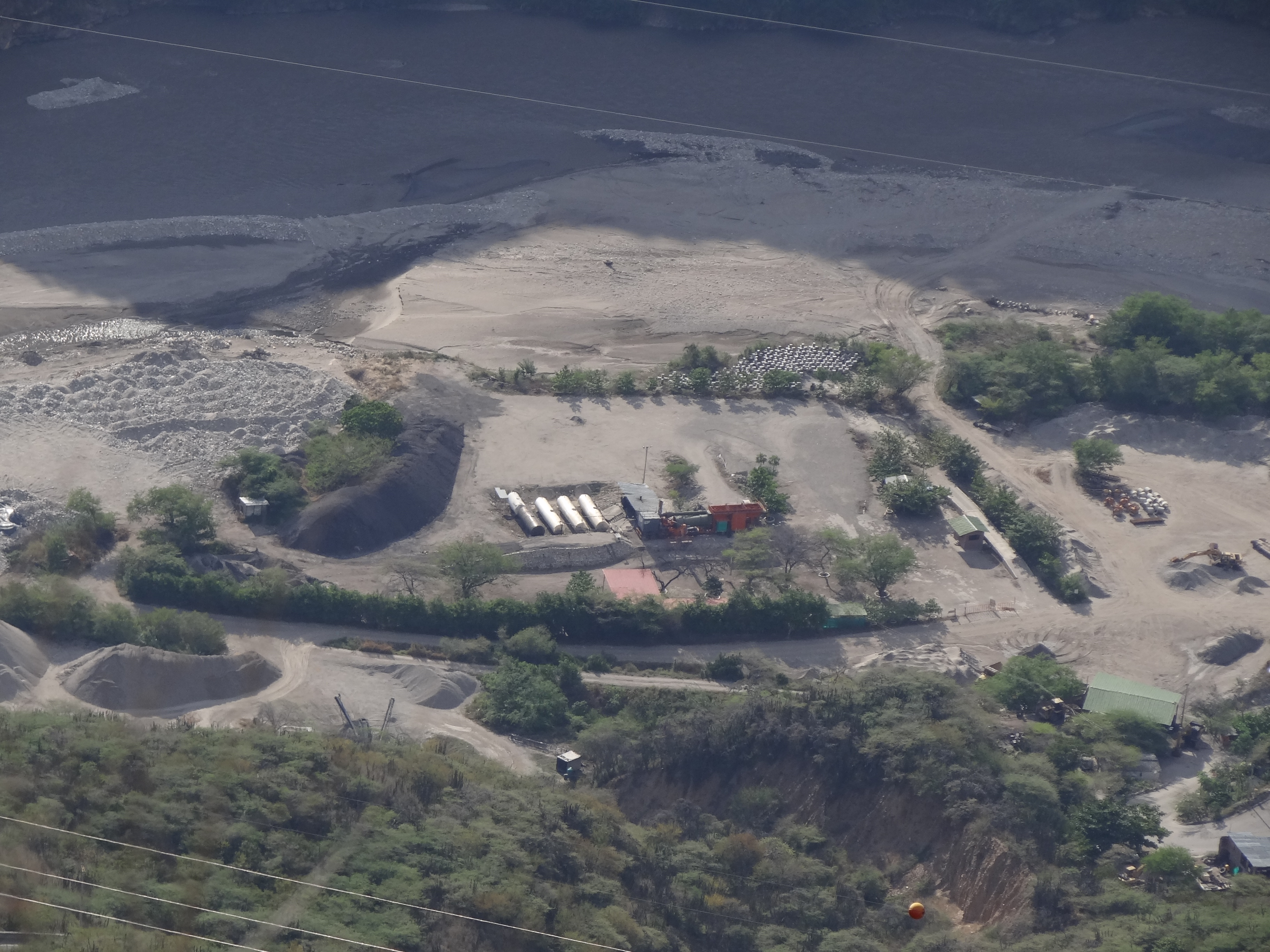 Fábrica de gravilla sobre el lecho del río Chicamocha, en inmediaciones al Parque Nacional del Chicamocha